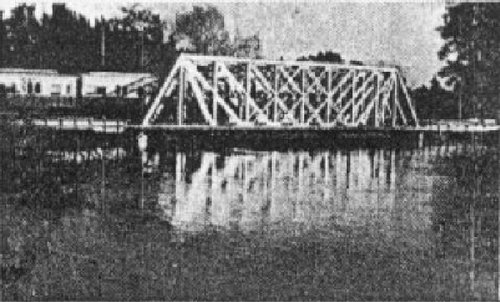 Puente de Paso del Rey, Merlo, Buenos Aires.